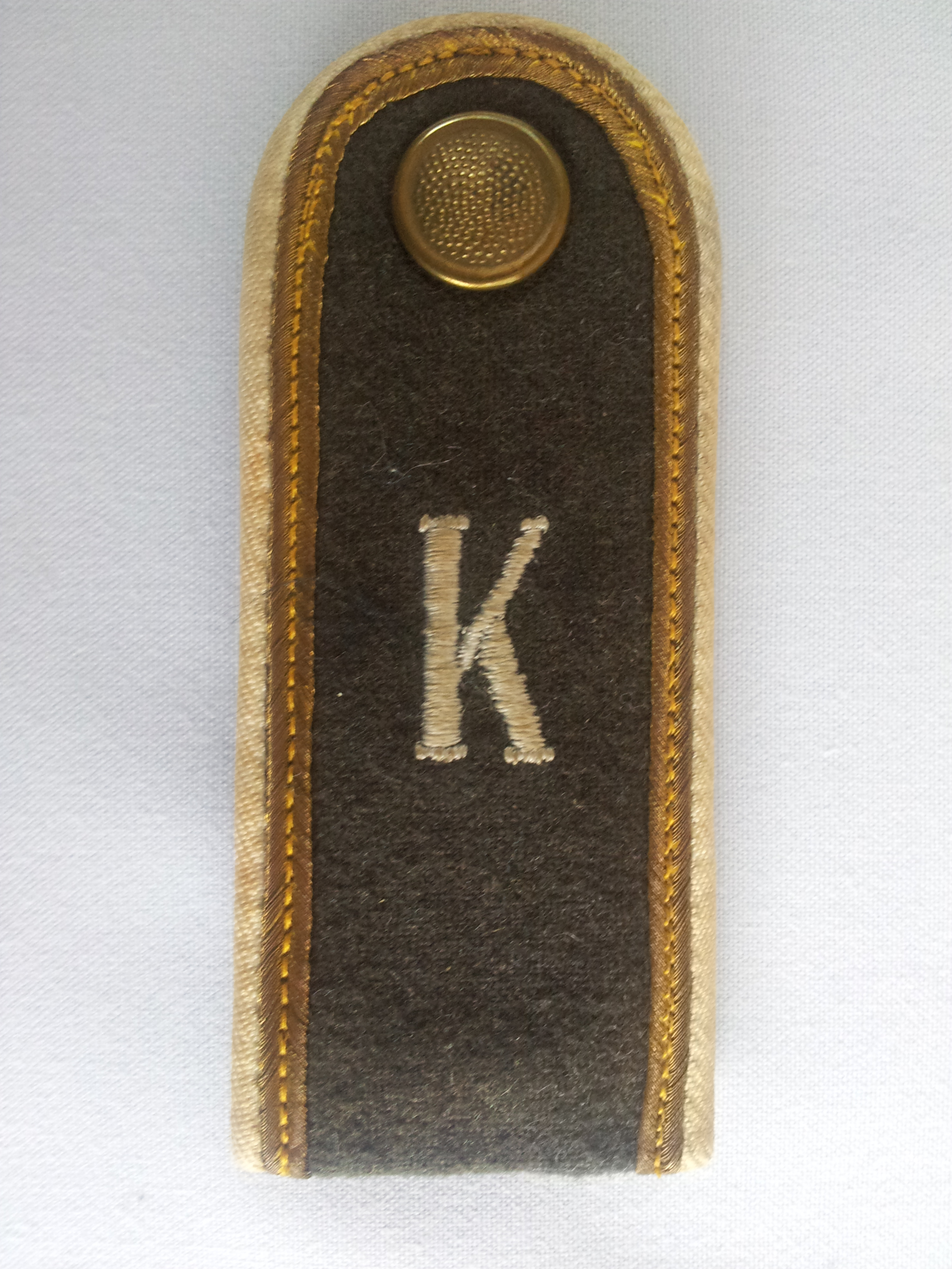 Rangabzeichen NVA der DDR, hier Schulterstück eines Kadettenschülers der ehemaligen Kadettenschule in Naumburg (Saale).